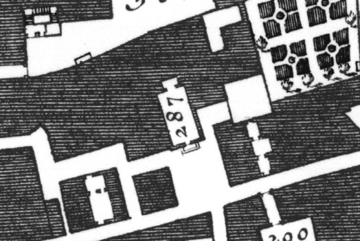 Pianta di Nolli